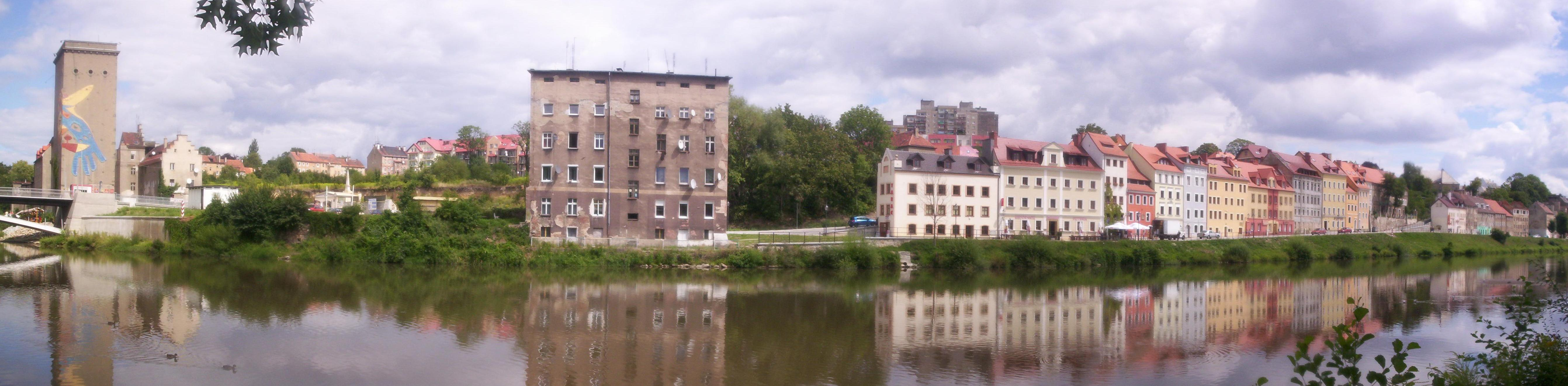 Panorama Zgorzelca